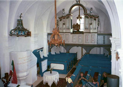 A homoródújfalvi unitárius templom belseje